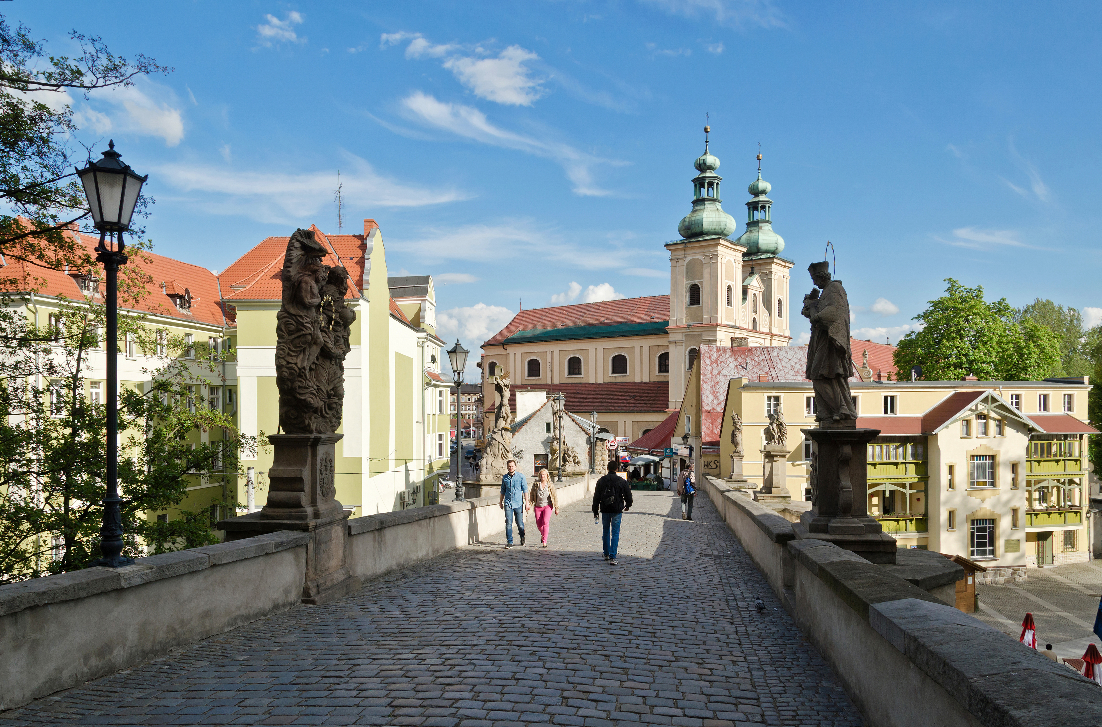 Kłodzko, most na młynówce, kon. XIV, 1628, 1701, 1750